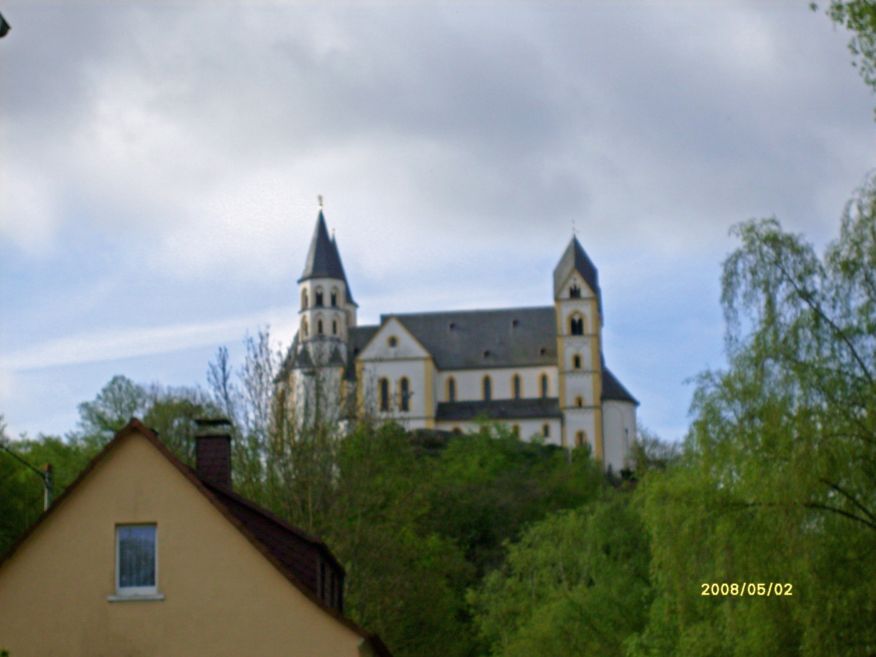 Kloster Arnstein von Obernhof